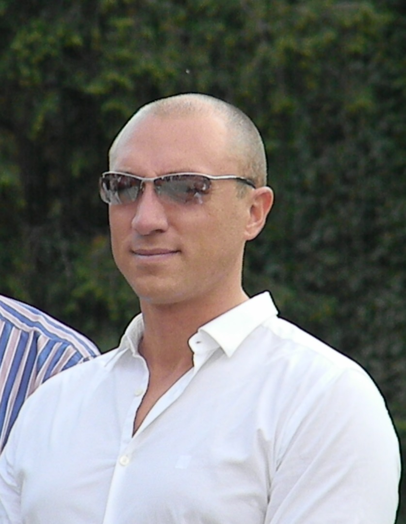 Il presidente dell'Associazione Sportiva Varese 1910 e patron di "Oro in Euro" Nicola Laurenza